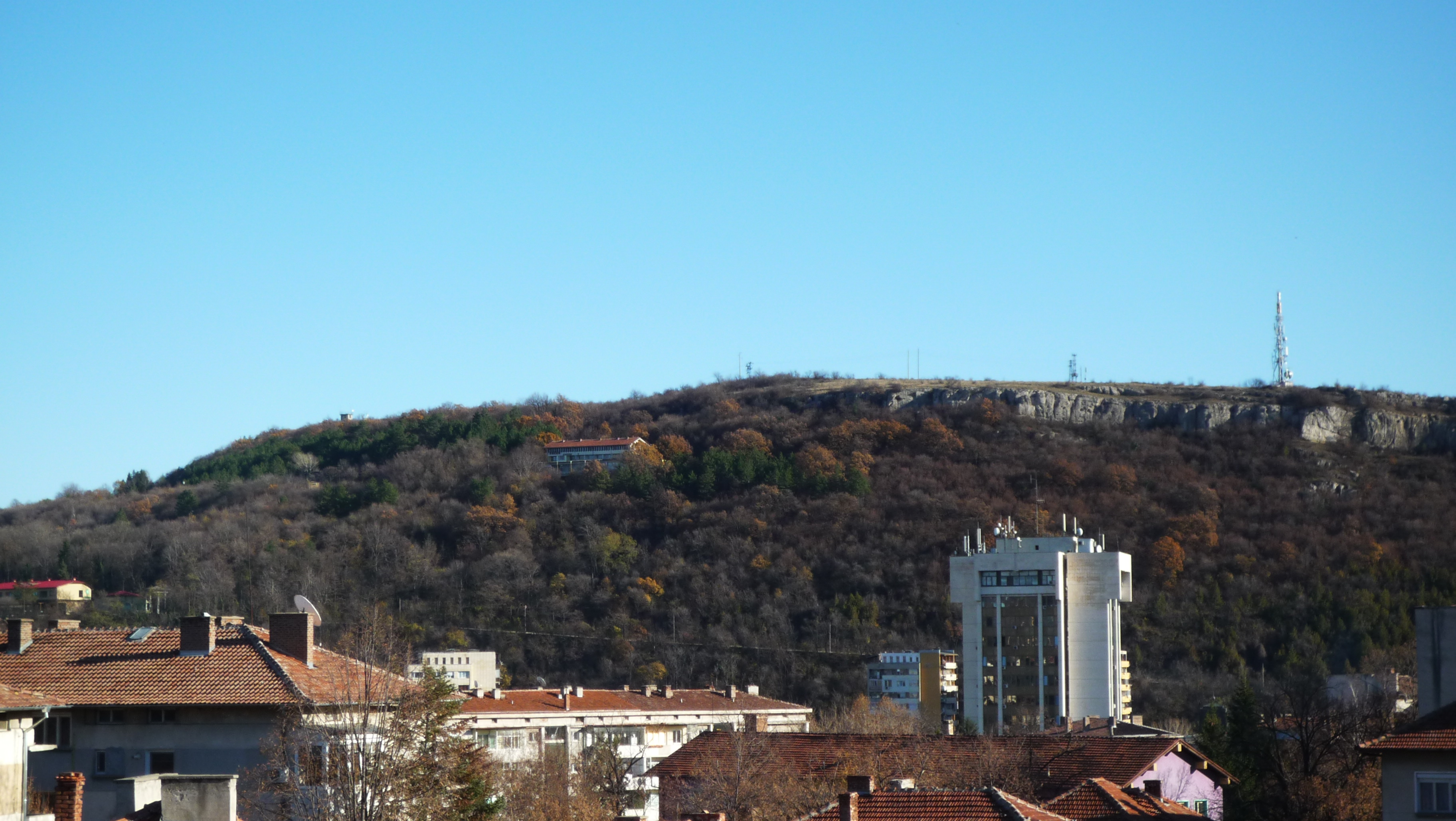 Ловеч-хълма "Стратеш"